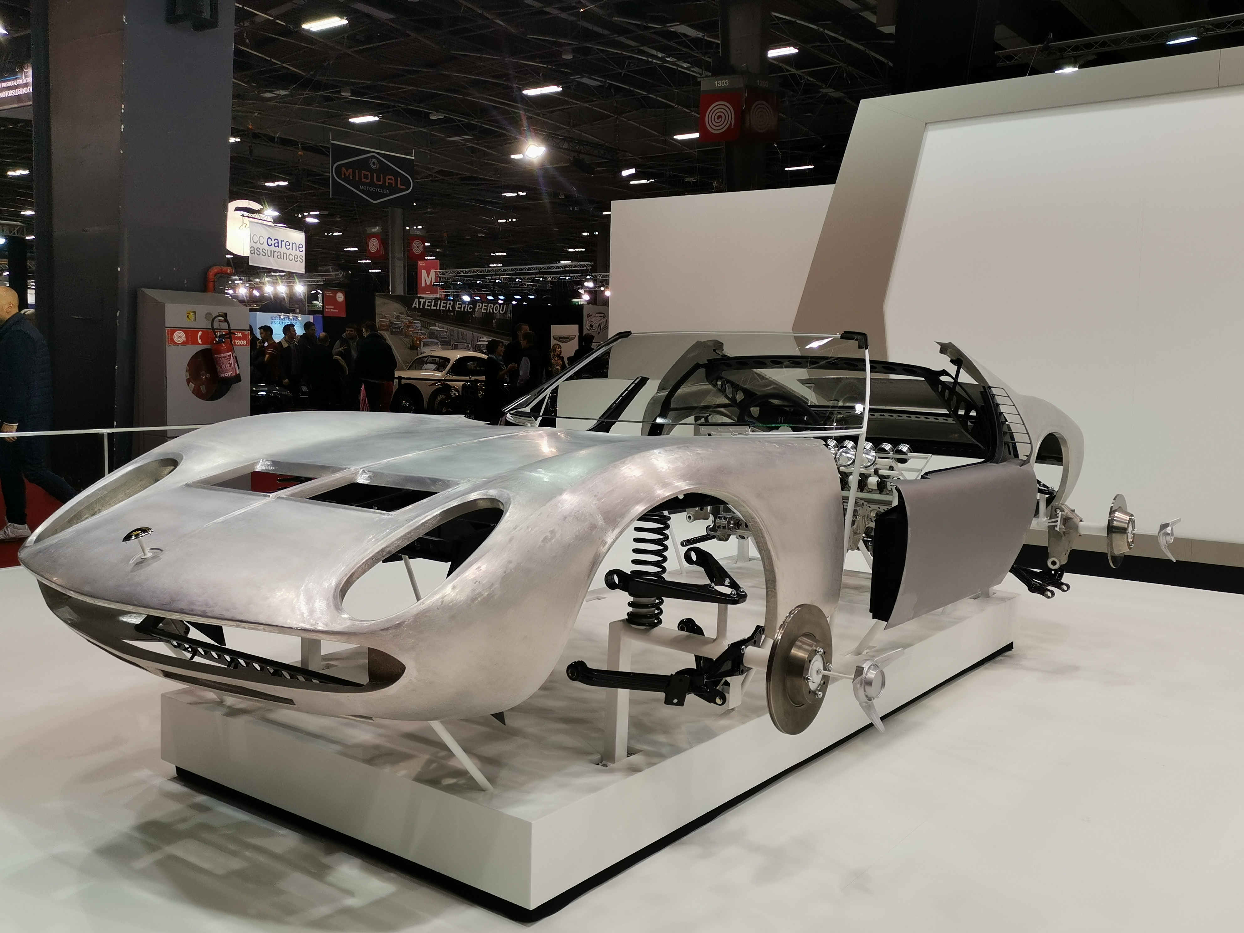 Une sculpture réalisée à partir d'une Lamborghini Miura